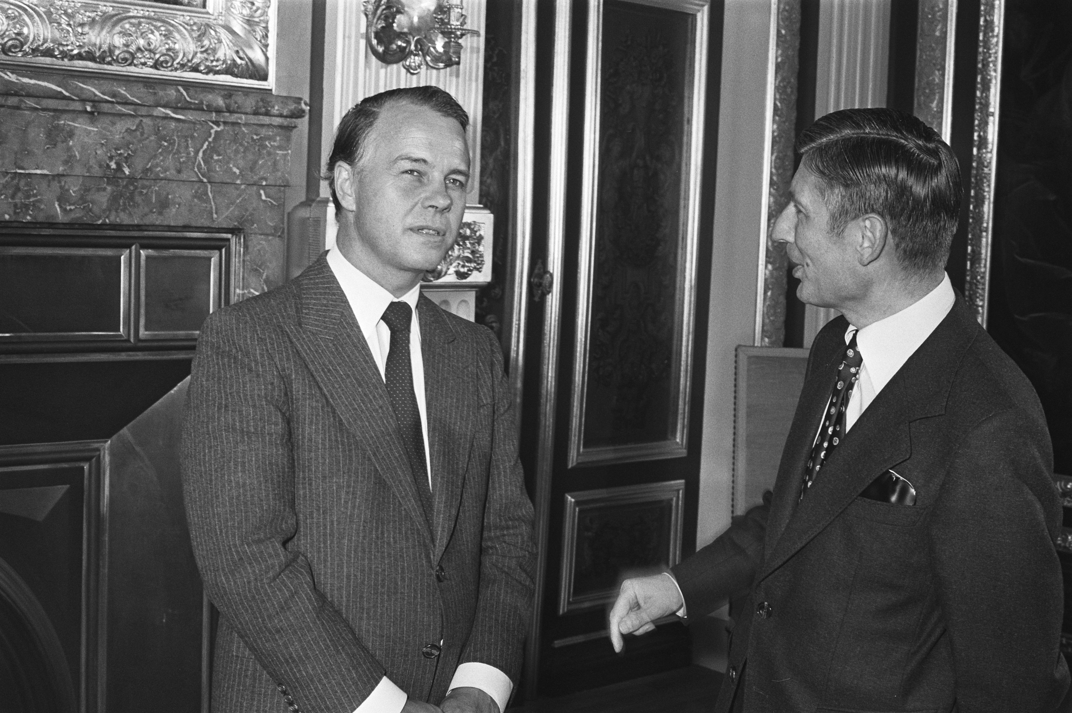 Collectie / Archief : Fotocollectie Anefo Reportage / Serie : [ onbekend ] Beschrijving : Premier Van Agt ontvangt minister president Ernst Albrecht van Neder Saksen Datum : 18 mei 1978 Trefwoorden : ontvangsten, premiers Persoonsnaam : Agt, Dries van Fotograaf : Suyk, Koen / Anefo Auteursrechthebbende : Nationaal Archief Materiaalsoort : Negatief (zwart/wit) Nummer archiefinventaris : bekijk toegang 2.24.01.05 Bestanddeelnummer : 929-7250